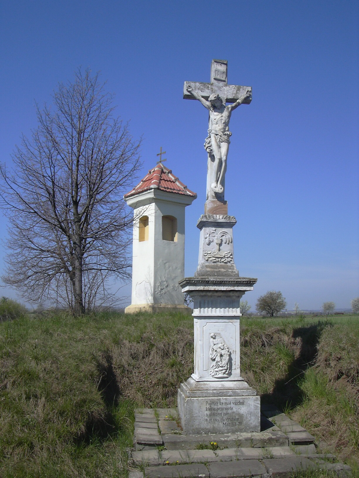 Křižanovice u Vyškova Kříž a boží muka na začátku obce (Vyškov District, Czech Republic)